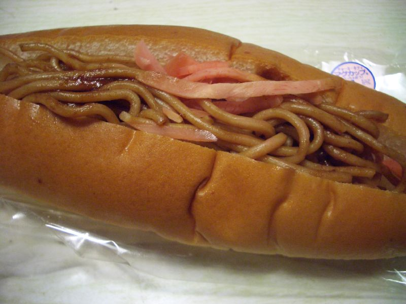 焼きそばパン